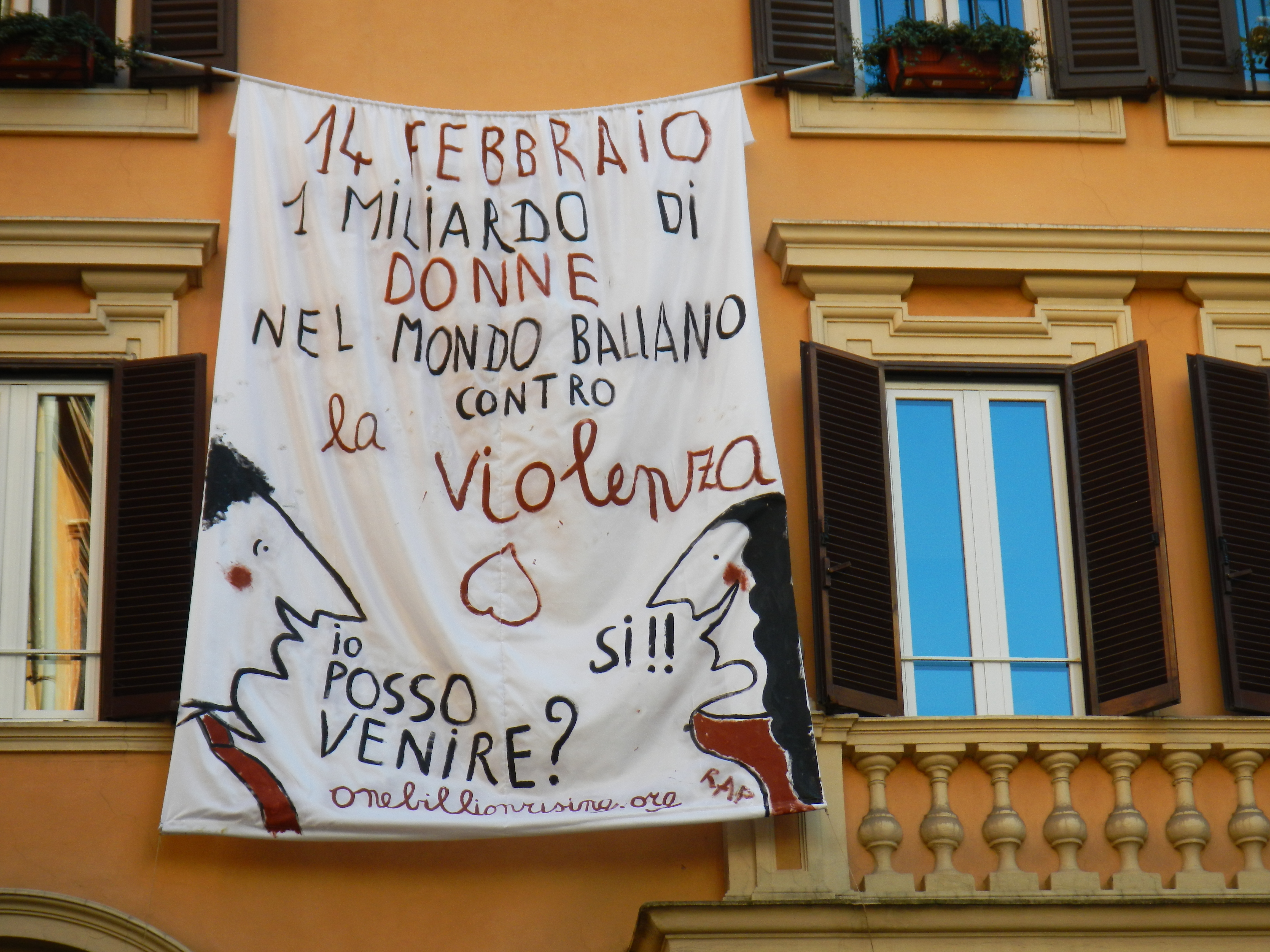 Striscione per la manifestazione contro la violenza sulle donne a Roma.